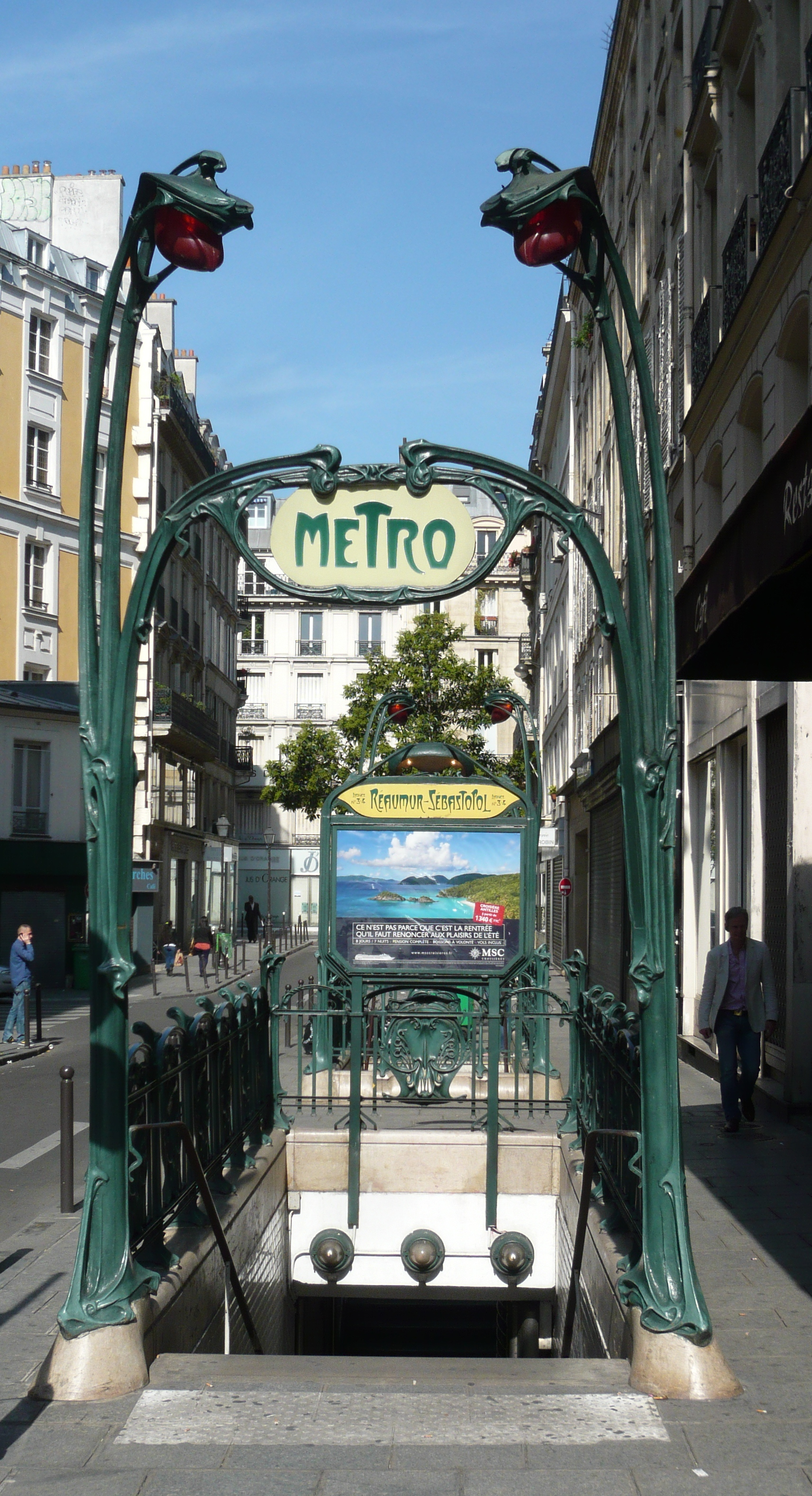 Edicule Guimard Métro Réaumur-Sébastopol